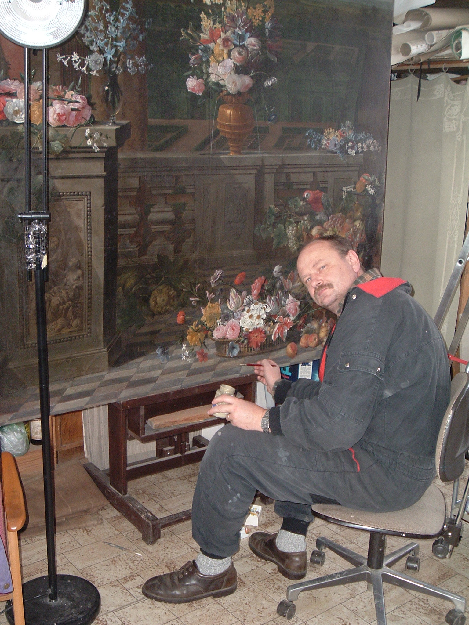 Martin Zálešák při práci..